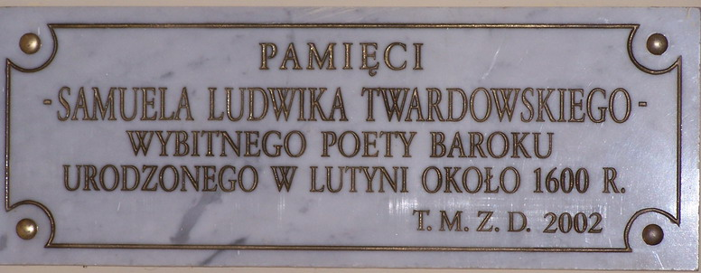 Tablica w kościele pw. Wniebowzięcia NMP, informująca o narodzinach Samulea Twardowskiego umieszczona dzięki staraniom Towarzystwa Miłośników Ziemi Dobrzyckiej w 2002 r.; Lutynia (powiat pleszewski), powiat pleszewski, woj. wielkopolskie